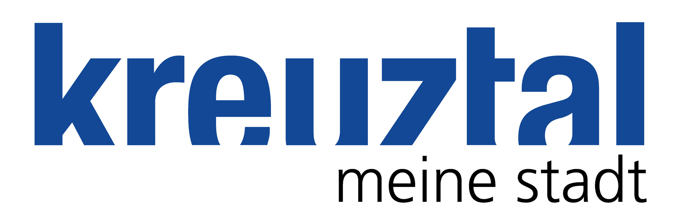 Test256426